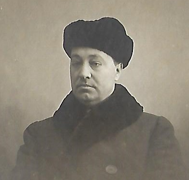 Eliel Sundström 1938